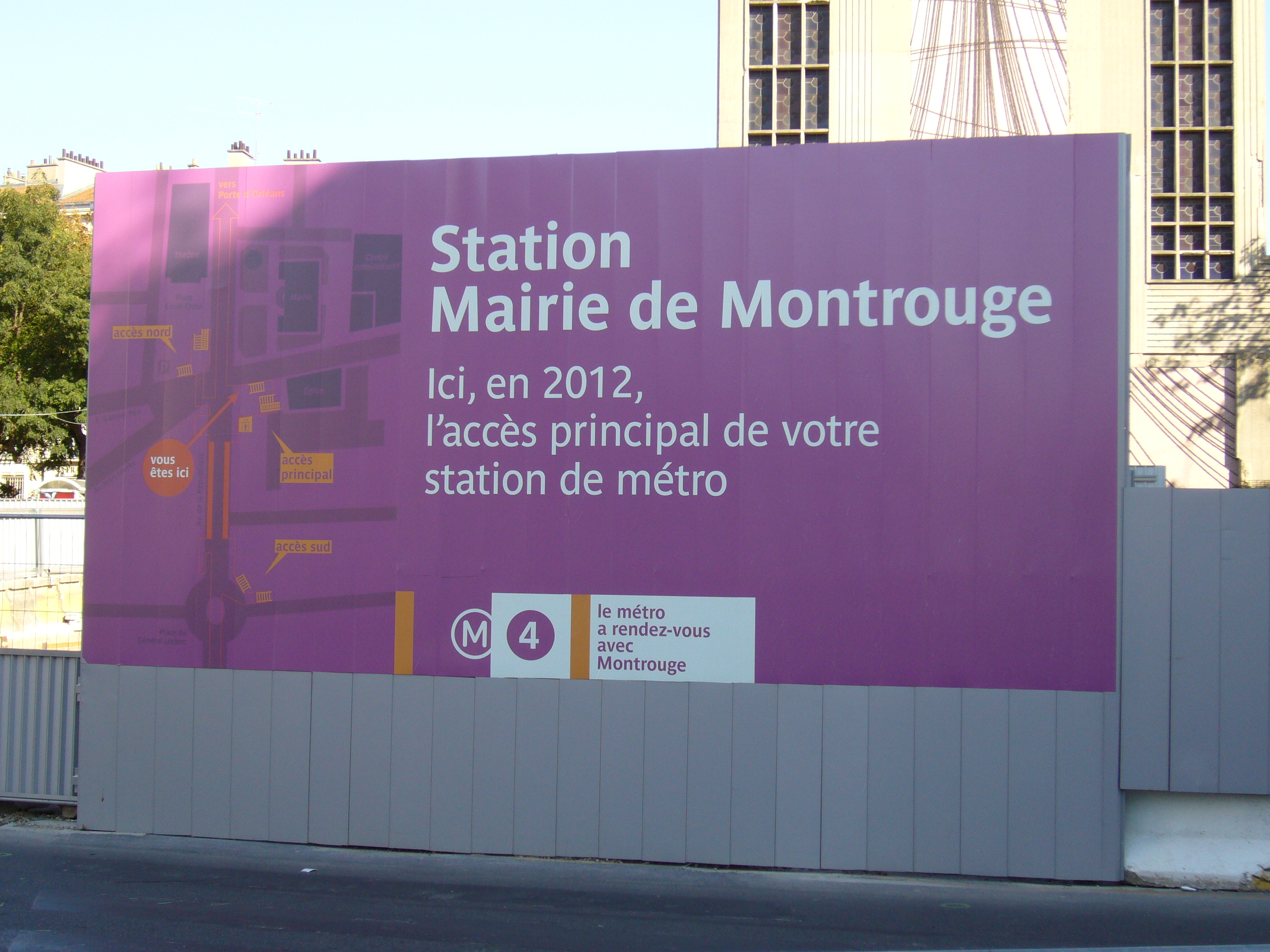 Futurs accès et emplacements de la station.